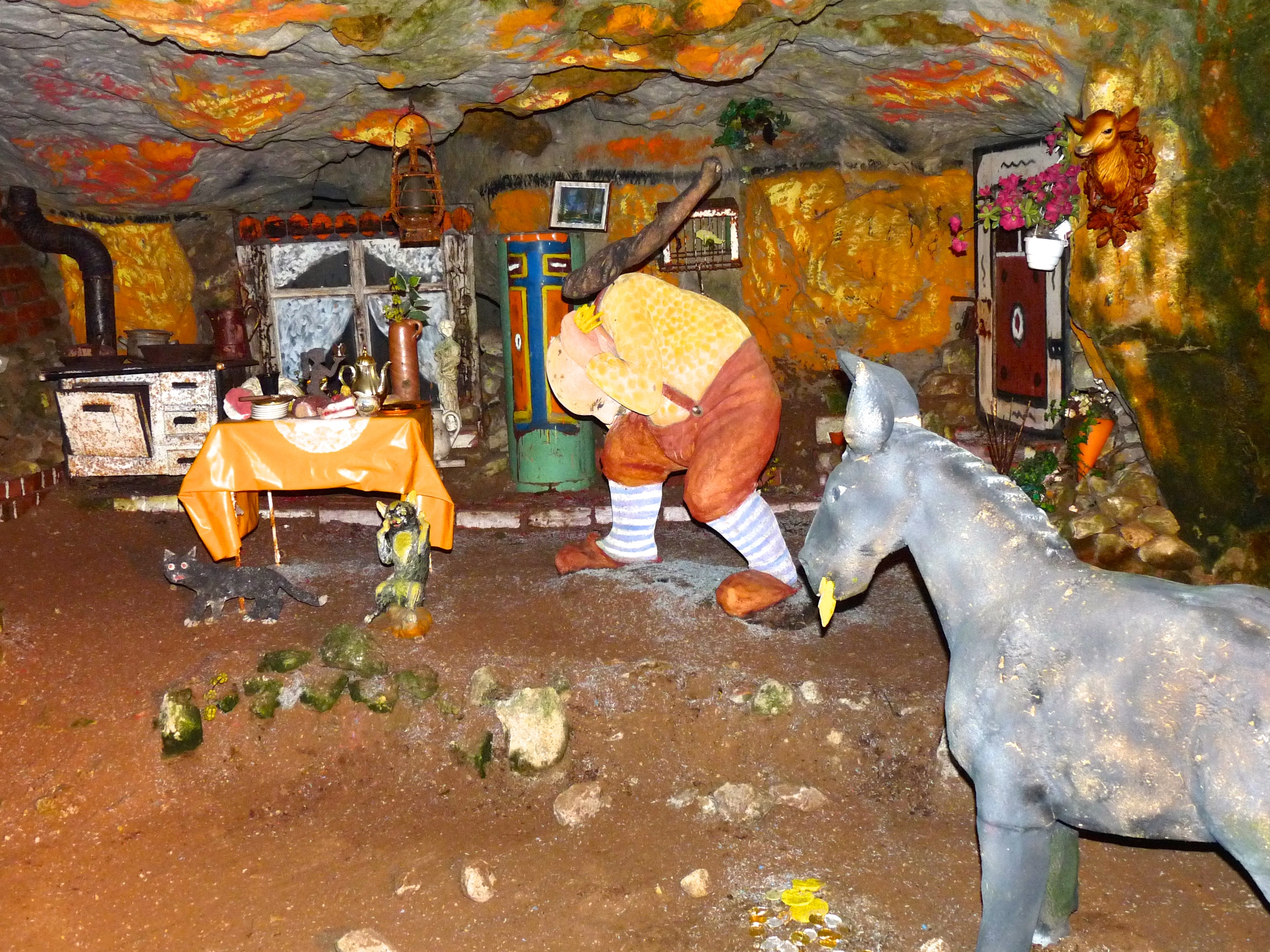 Tischchen deck dich in der Märchenhöhle Walldorf.